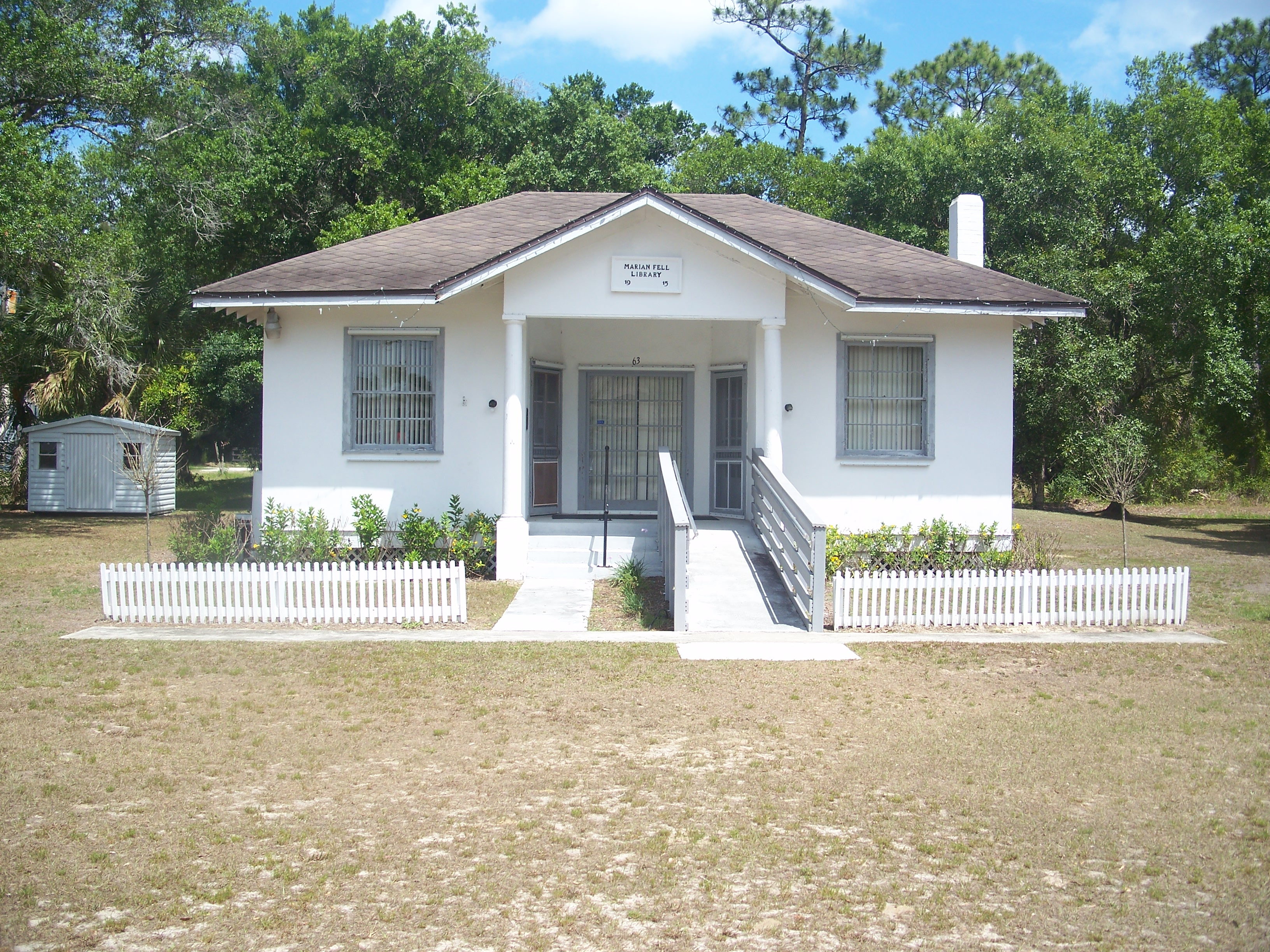 Fellsmere, Florida: Marian Fell Library